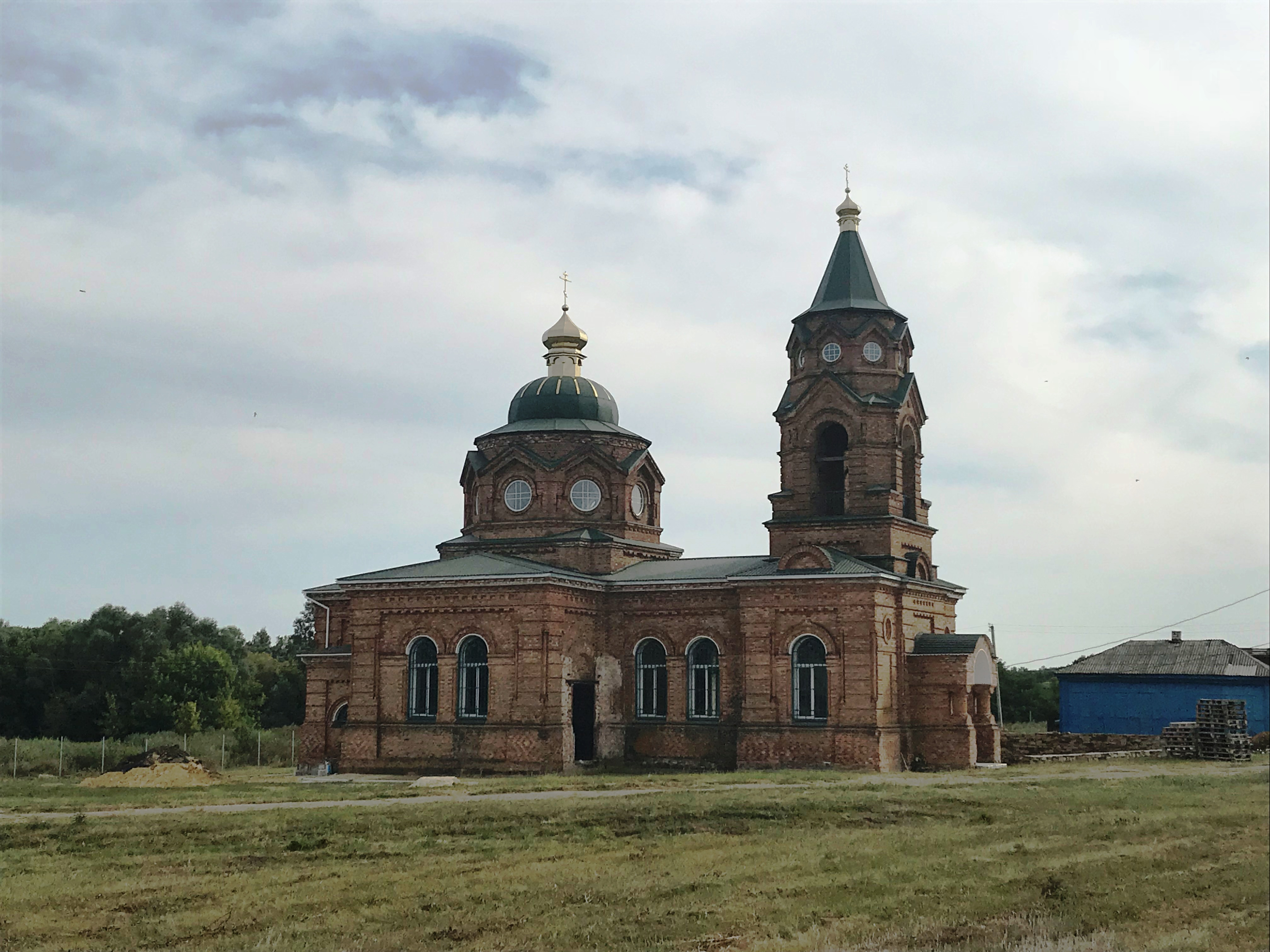 Троїцька церква (мур.), село Півнівка, вул. Шкільна, 12